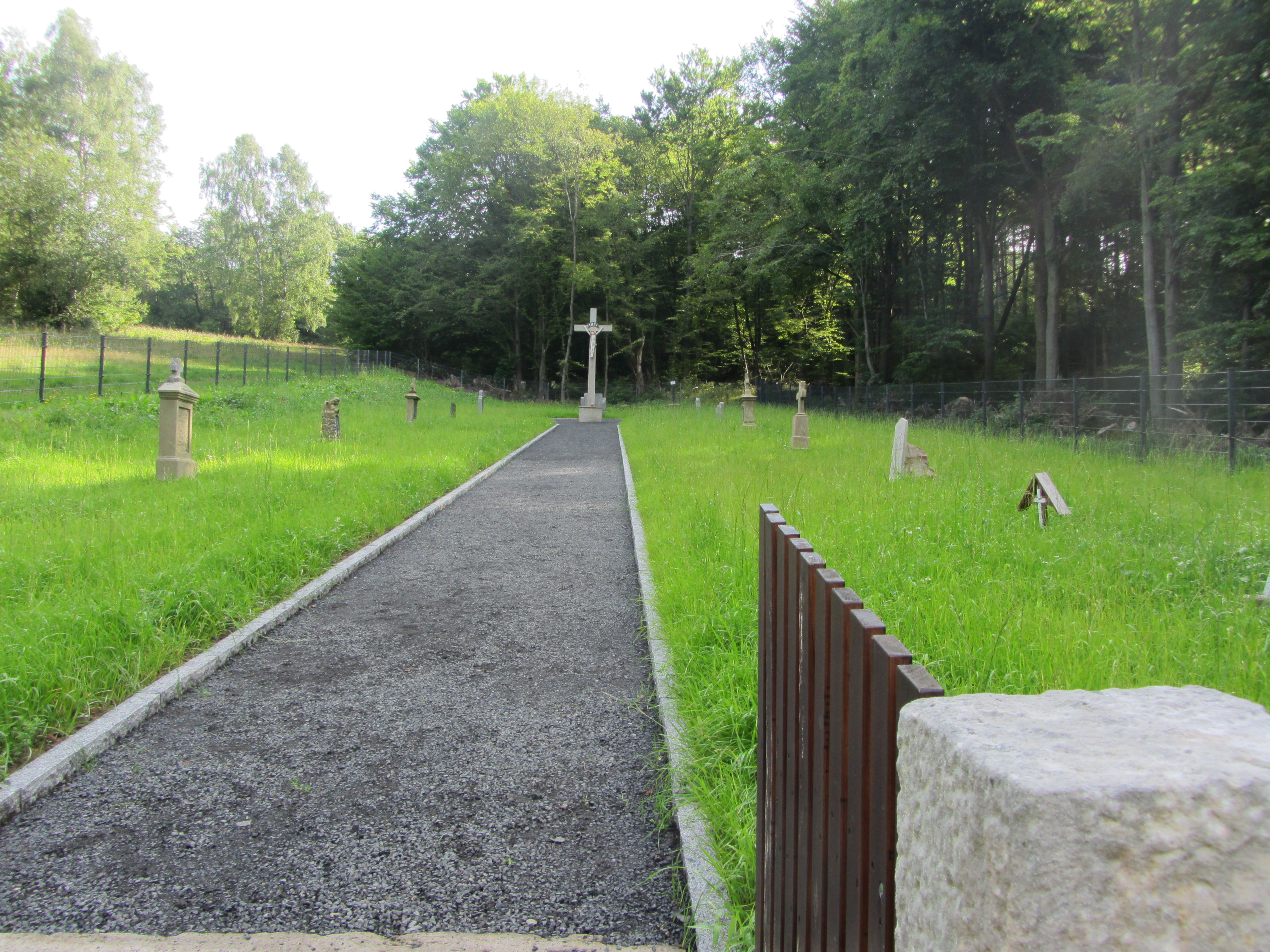 Ansicht vom Werberger Friedhof